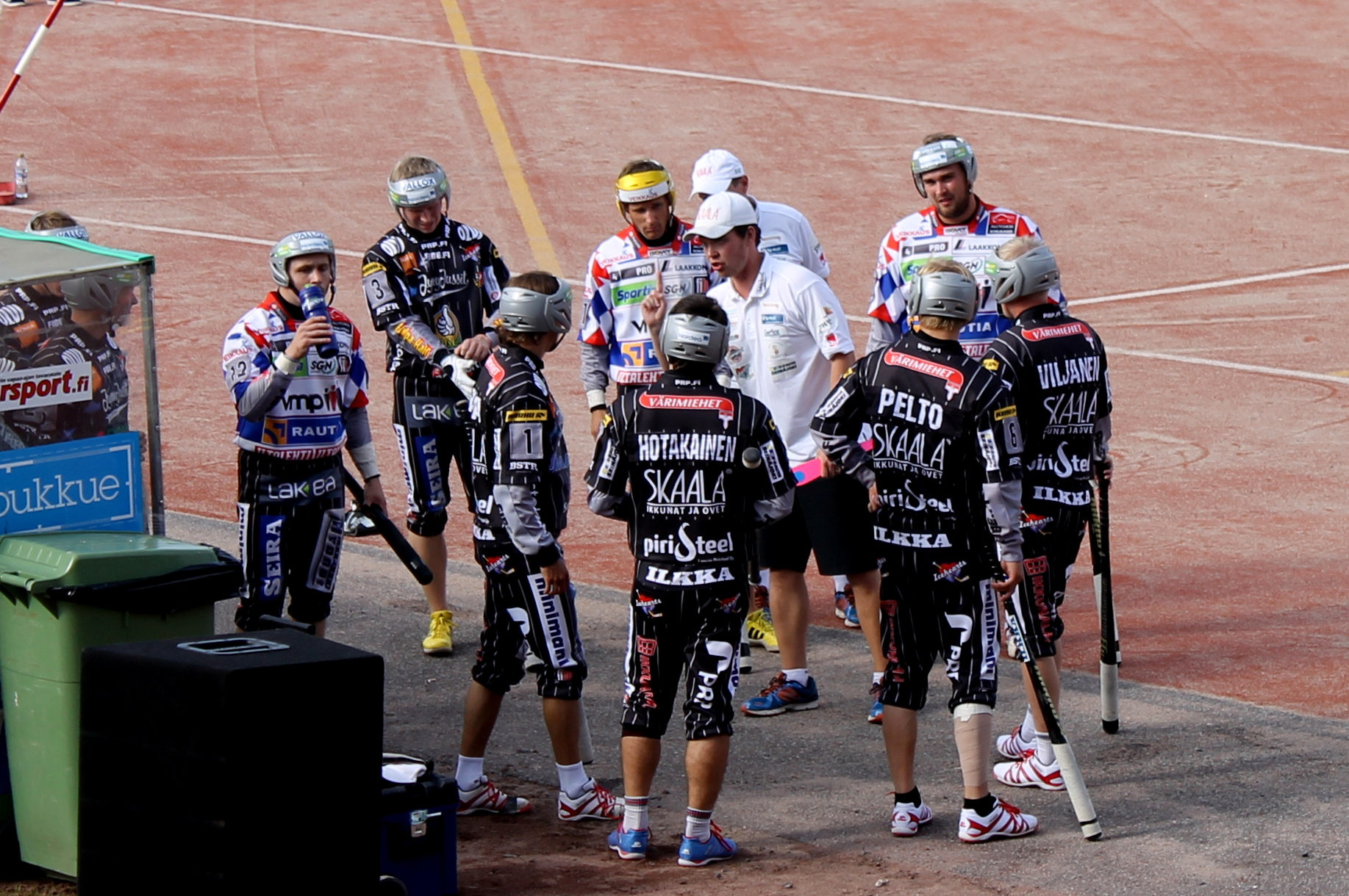 Jymyjussien pelaajat vaihtokopilla